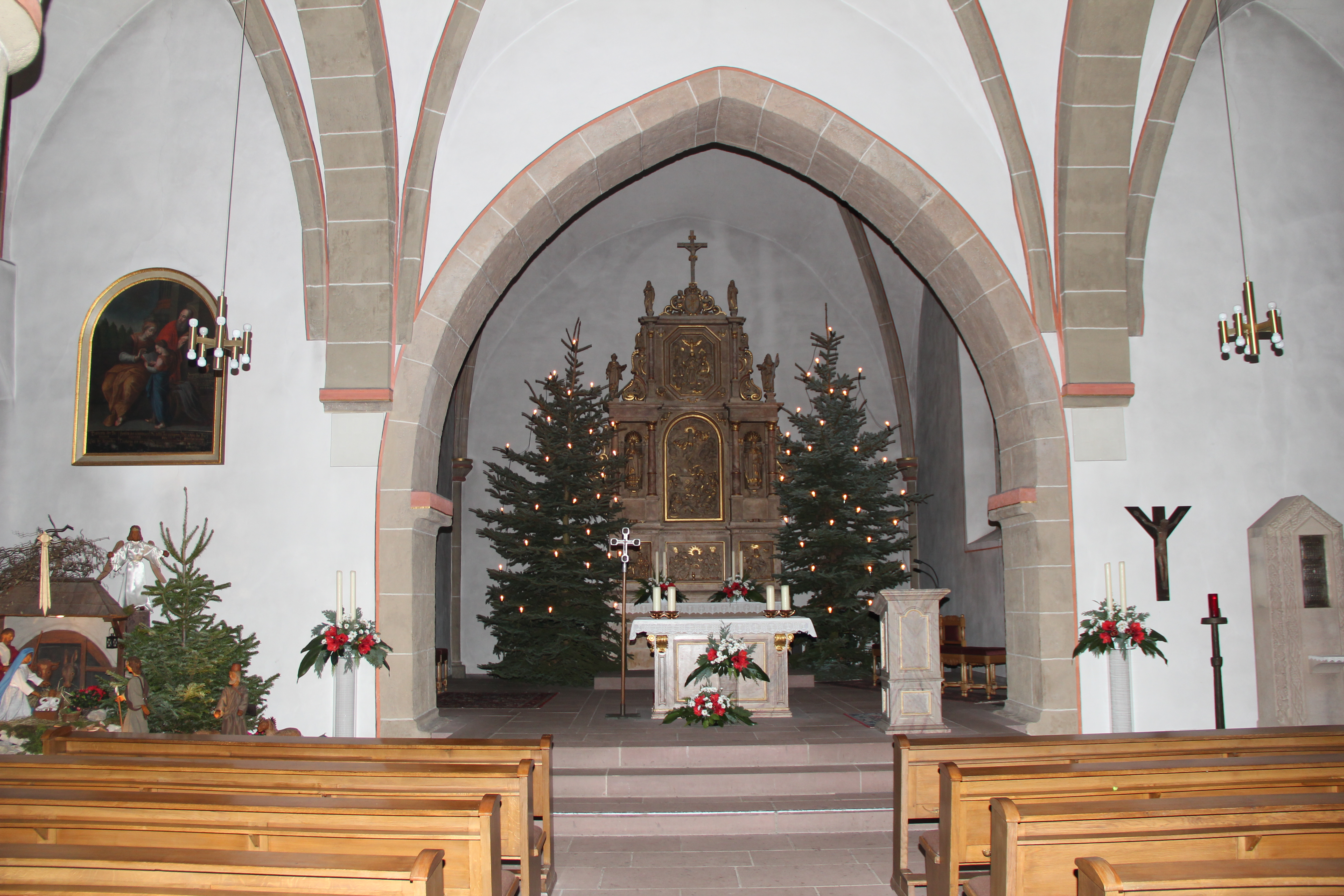 Innenansicht der Kirche St. Kilian in Lichtenau, links die Krippe von Josef Picker